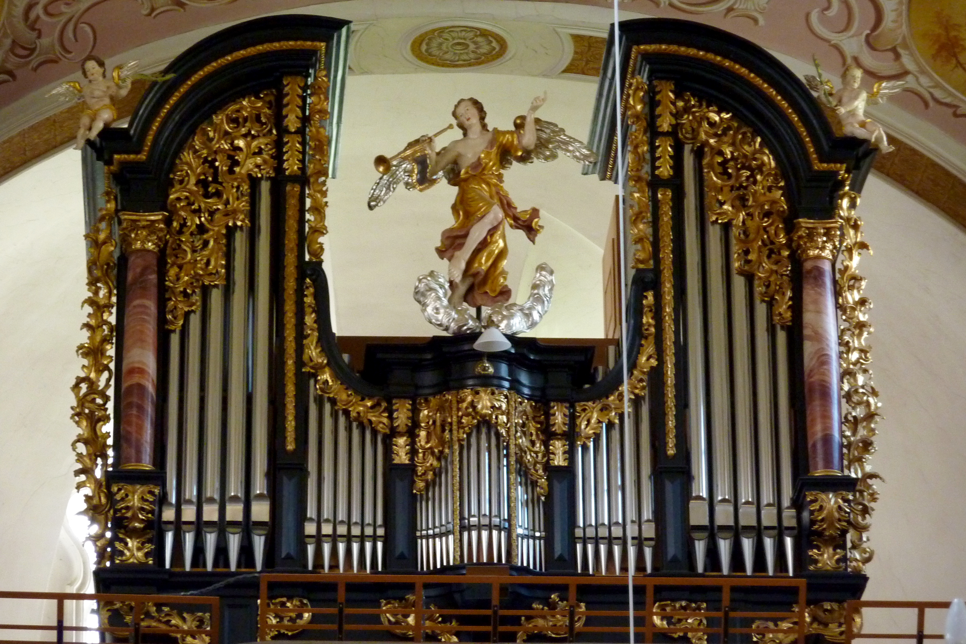 Katholische Pfarrkirche St. Peter und Paul (ehemalige Abteikirche des Klosters Thierhaupten) in Thierhaupten, einer Gemeinde im Landkreis Augsburg, Orgel